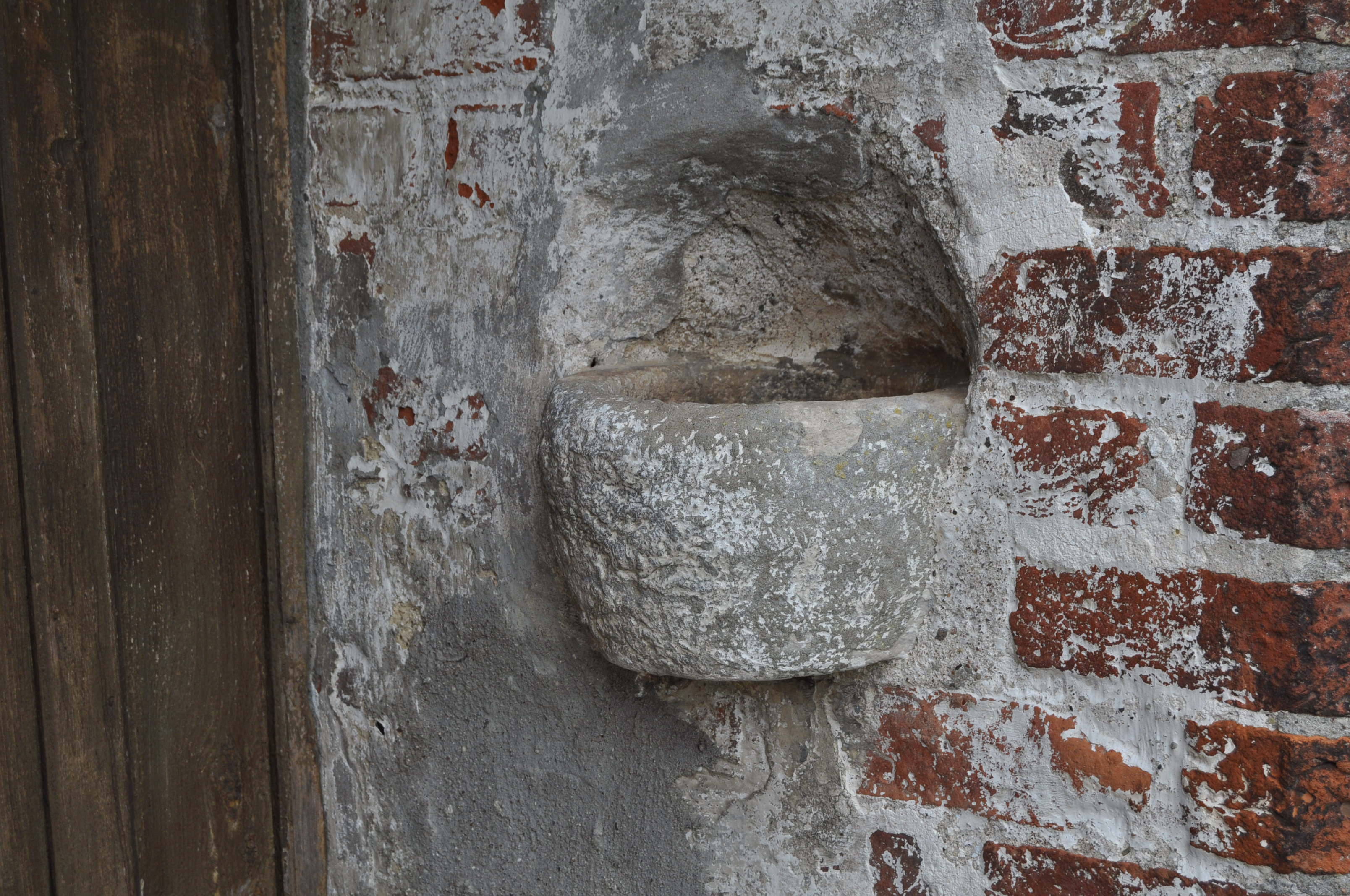 Weihwasserbecken vor der Reformation - Kirche Neuenkirchen